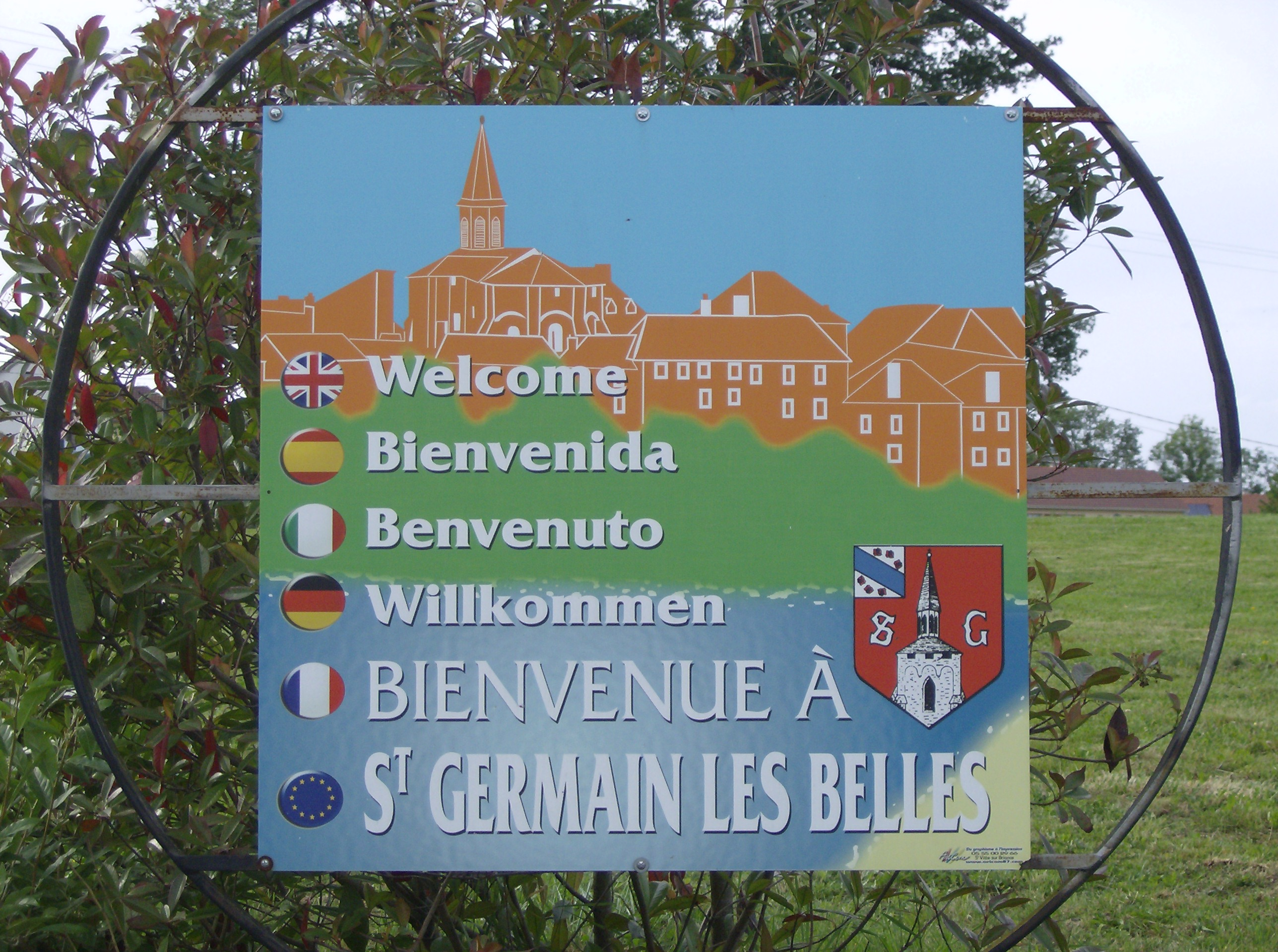 Saint-Germain-les-Belles: panneau d'accueil